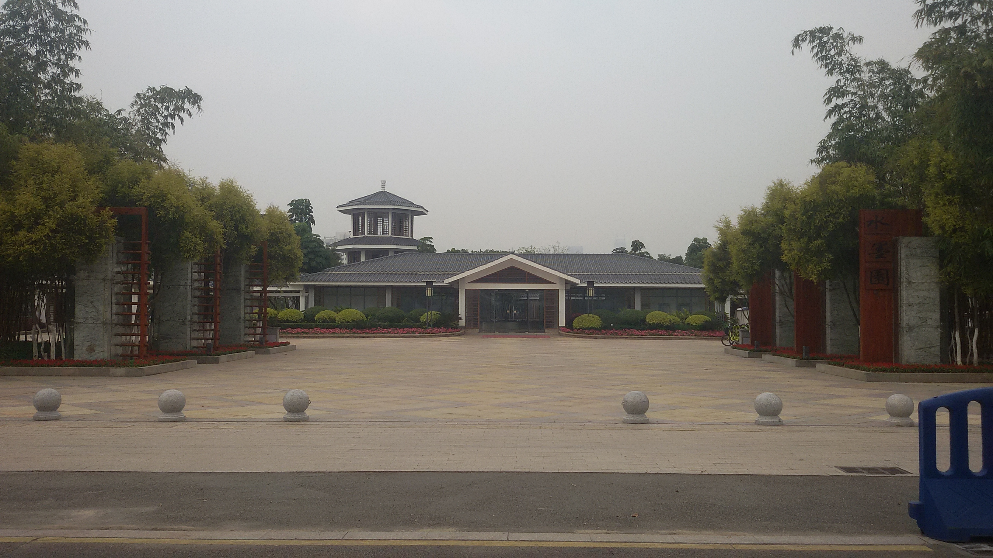 粵語: 黃埔區官洲嘅水墨園景區正門